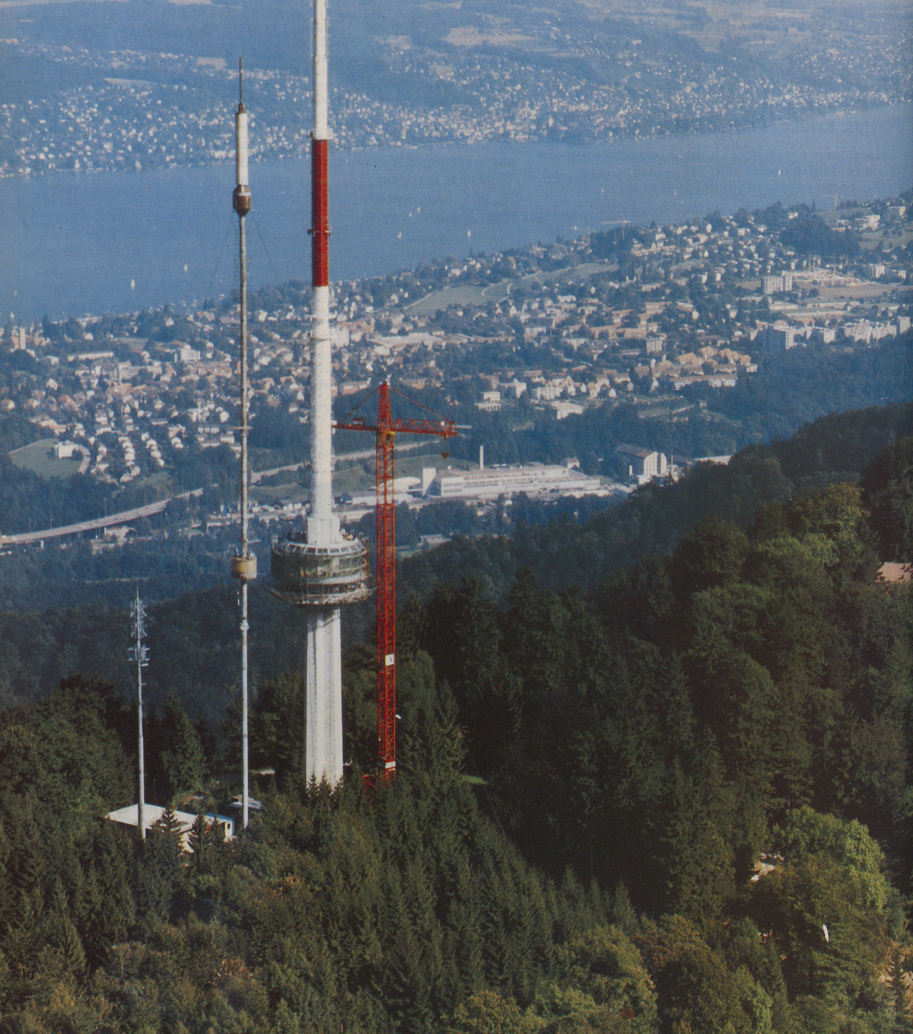 Flugaufnahme. Nach 30 Jahren Betriebszeit wurde 1990 der alte Sendeturm in einer spektakulären Aktion aus der Luft demontiert. An seiner Stelle wurde eine neue Antenne in Betrieb genommen, die die Bevölkerung der Agglomeration Zürich mit Fernseh-, Radioprogrammen und Lokalradios versorgte.